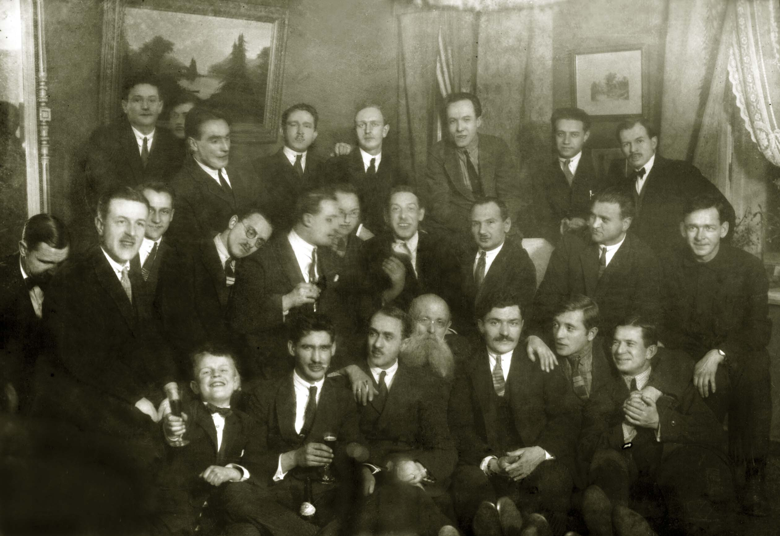 Сотрудники Отдел морского опытного самолётостроения (ОМОС) главного конструктора Д. П. Григоровича. Сидят во втором ряду (слева направо): третий - В. Б. Шавров, четвёртый (в очках) - К. А. Виганд, шестой - П. Д. Самсонов, восьмой - А. Н. Седельников. Стоят в третьем ряду (справа, налево) В. Л. Корвин-Кербер, А. Л. Гиммельфарб, четвёртый - А. Н. Колпаков. Завод "Красный Летчик" на Ушаковской наб., д. 1